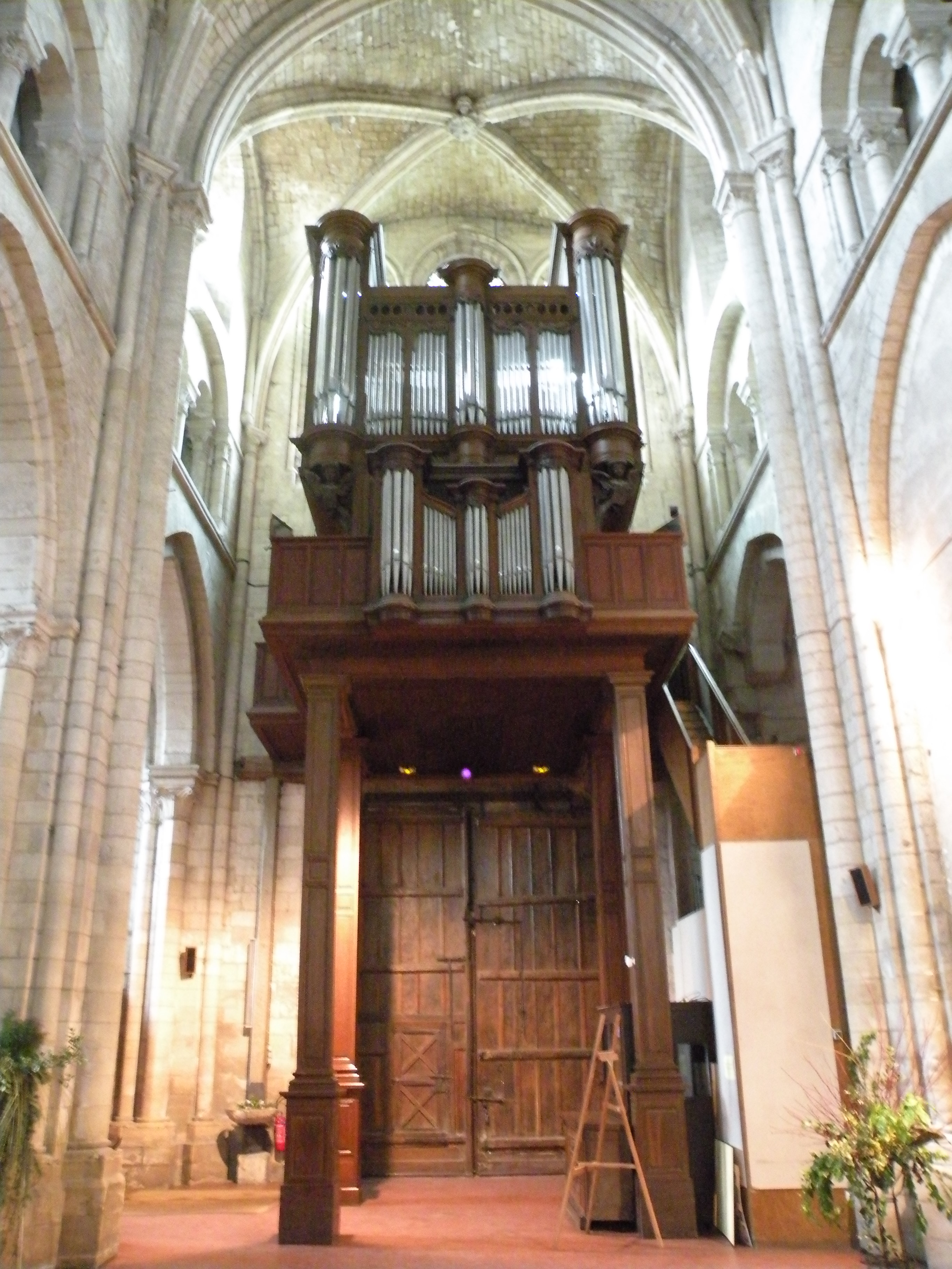 grand orgue de l'Église Saint-Étienne de Beauvais